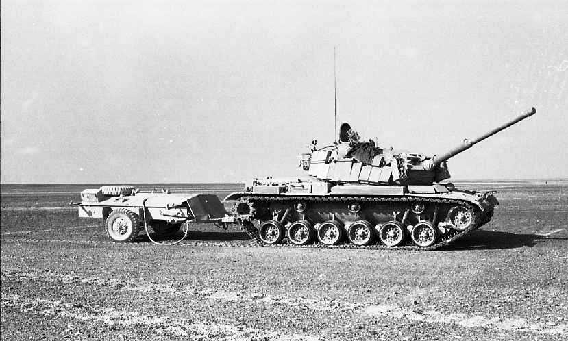 "עגלה 34" היא מערכת פריצת שד"מ (שדות מוקשים) נ"ט (נגד טנקים). הפעלת המערכת יצרה נתיב בטוח למעבר רק"מ (רכב קרבי משוריין) באורך של 100 מטר וברוחב של כ-12 מטר.